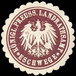 Sealing stamp Title: Königlich Preussisches Landrathsamt - Eschwege Description: braun, weiß, geprägt Place: Eschwege size: 4 cm